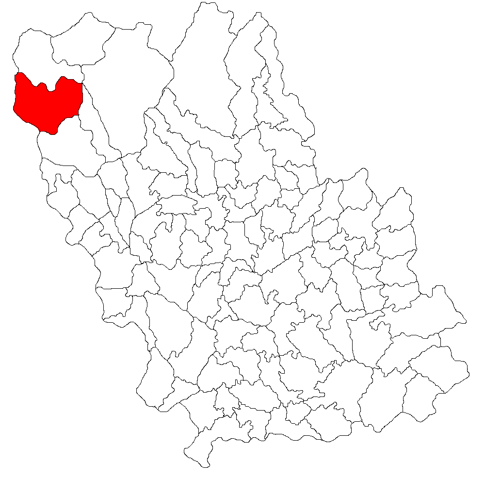 Categorie:Hărţi ale judeţului Prahova